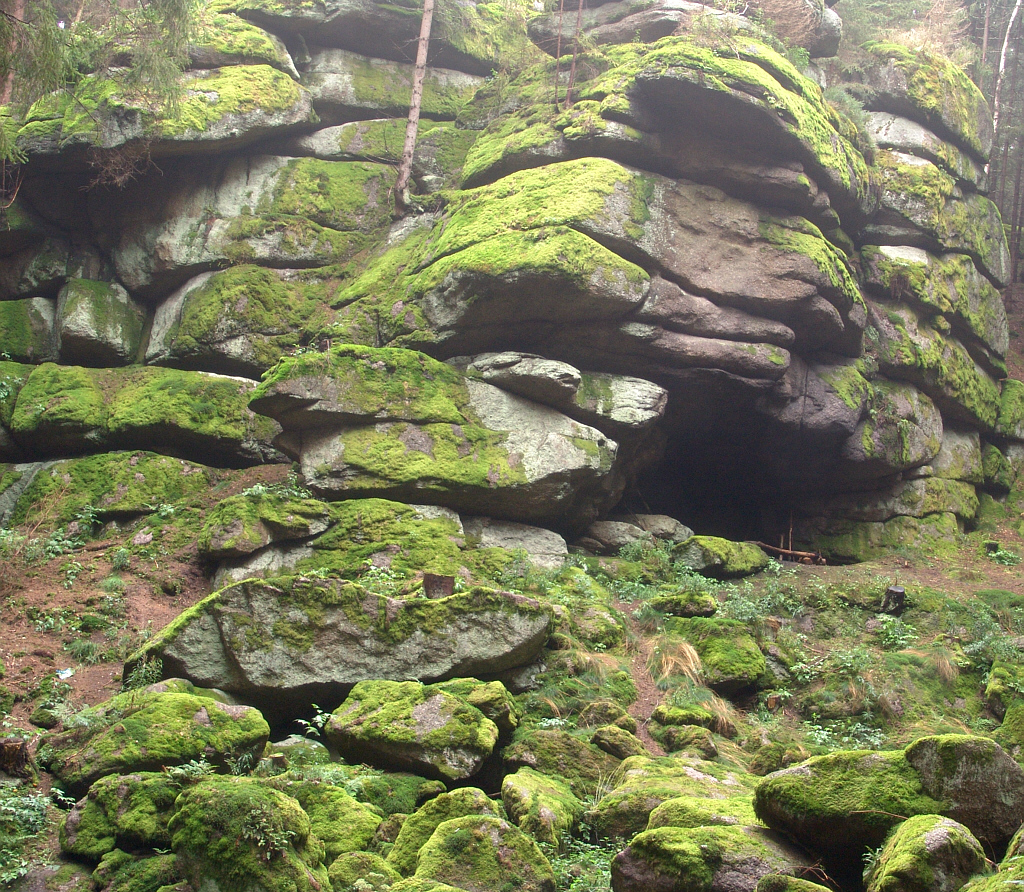 Granitfelsformationen in der Großen Teufelsküche, bei Pilmersreuth südlich von Tirschenreuth im Oberpfälzer Wald.